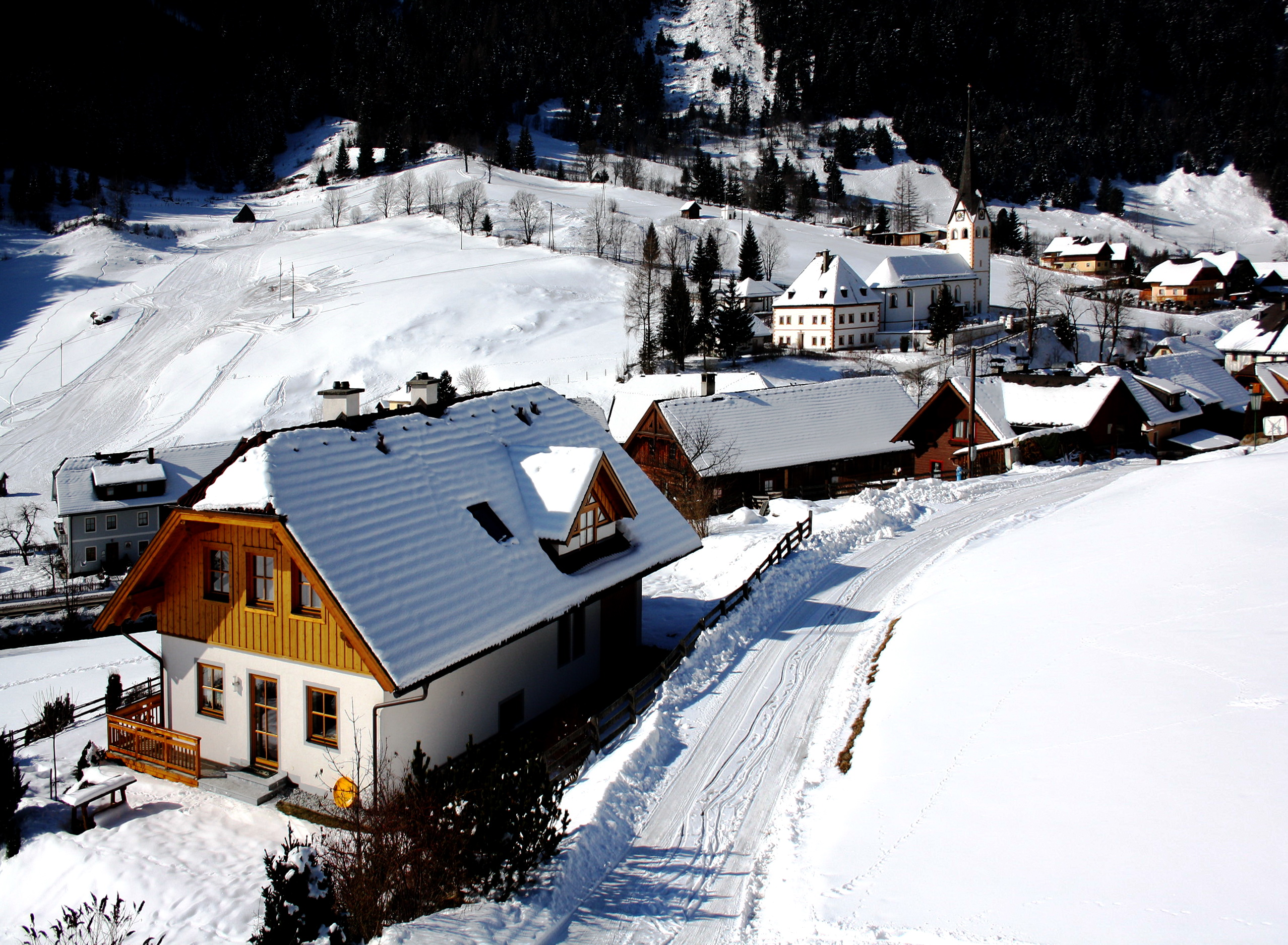 Blick in den Ort Muhr im Murtal.